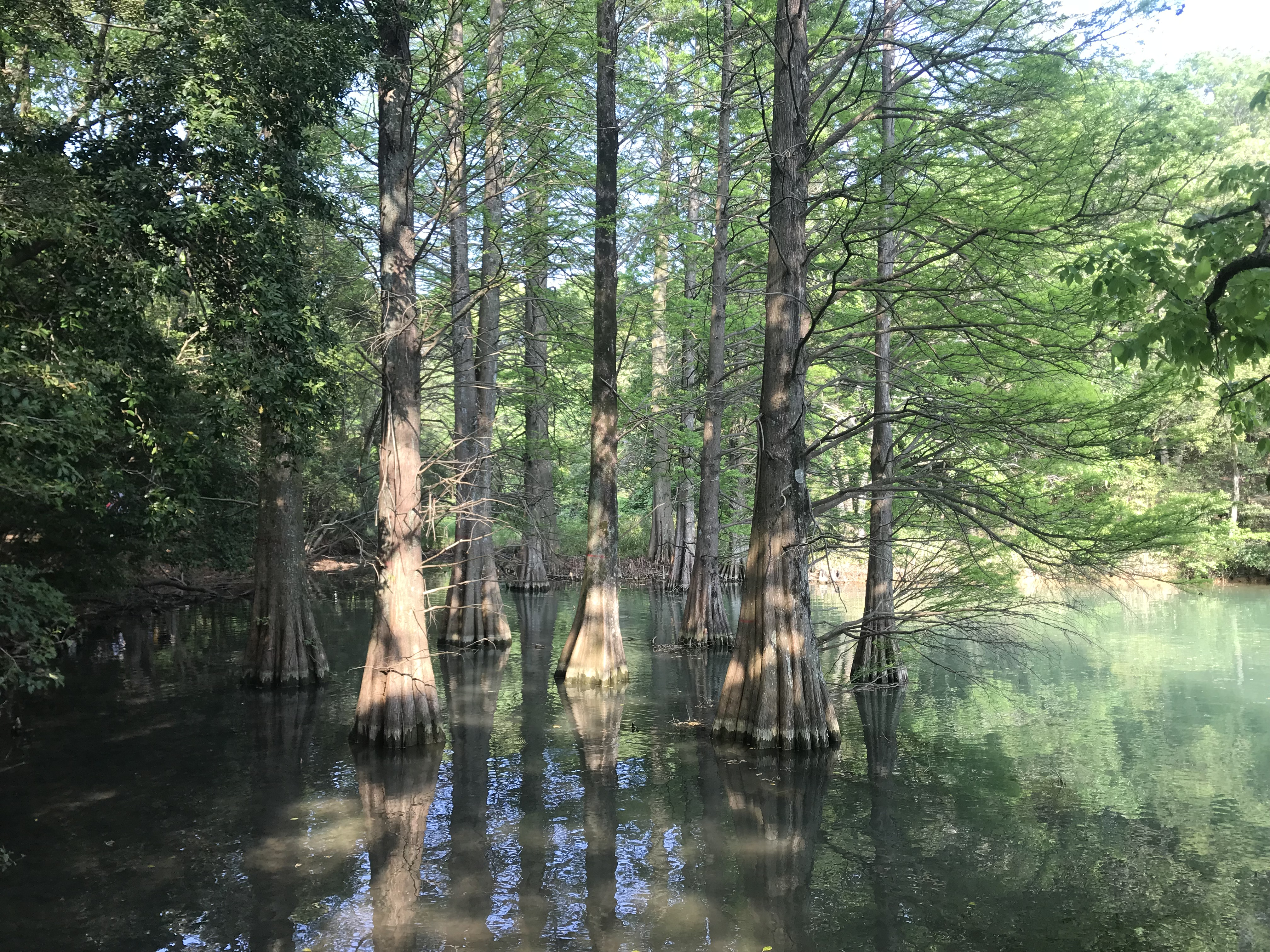 篠栗九大の森のラクウショウ